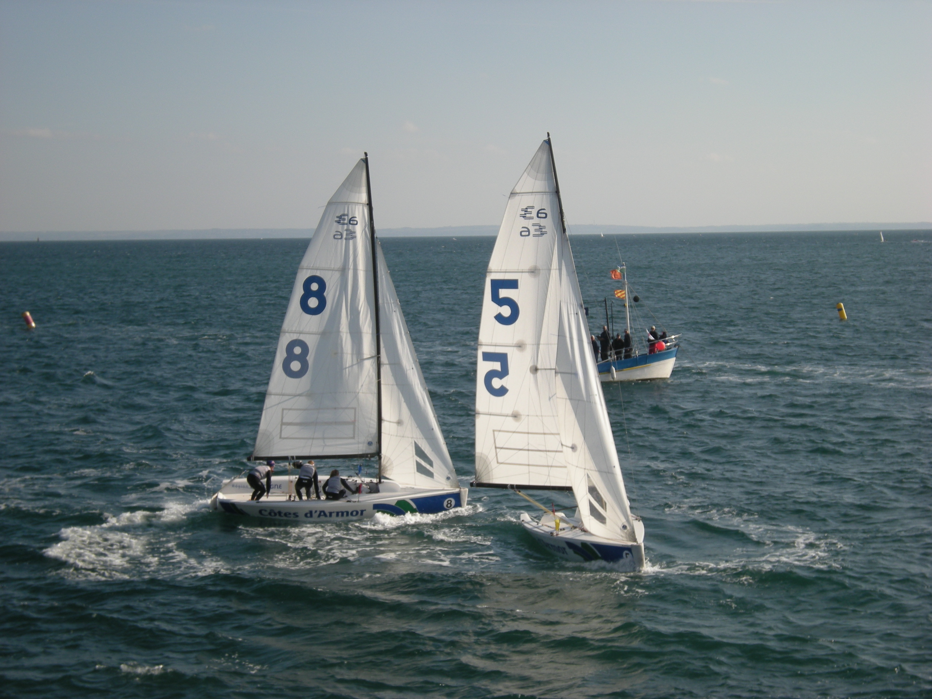 Lucy Macgregor (8) contre Claire Leroy (5) dans les 4 mn avant le départ d'une des 5 manches de la finale de Saint-Quay 2011